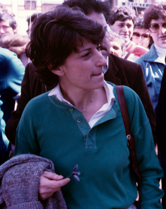 Adelaide Aglietta con Enzo Tortora alla marcia per la pace 1985